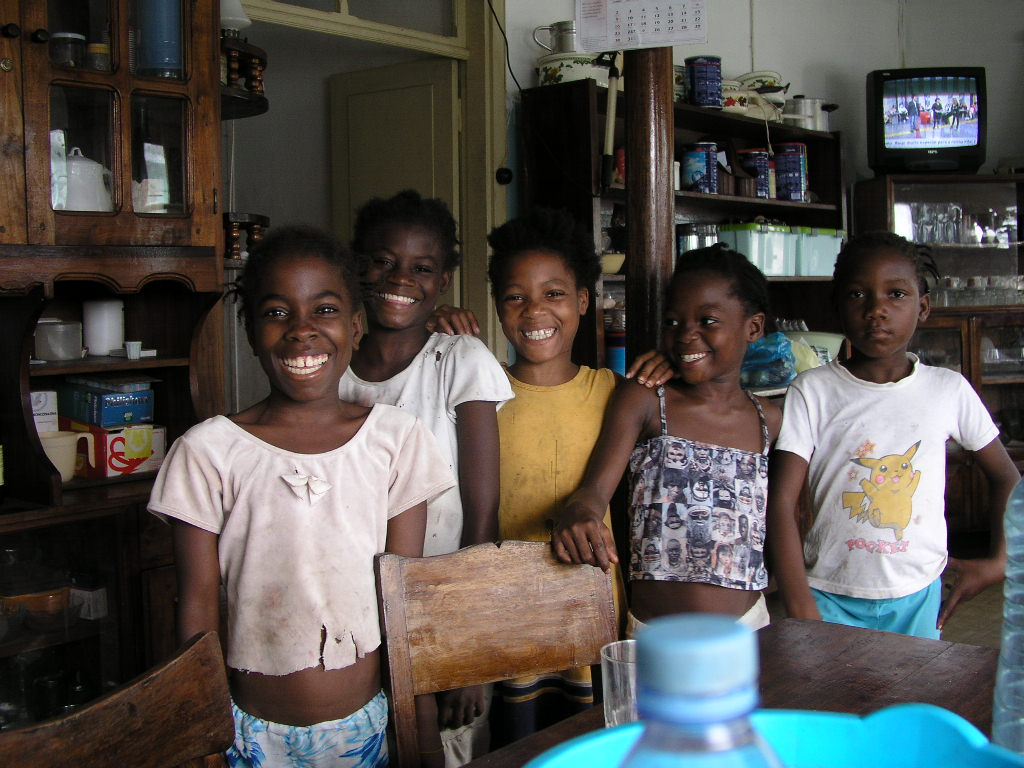 Crianças em São Tomé e Príncipe.